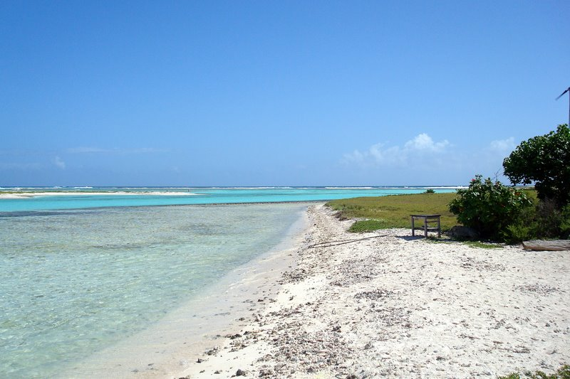 Los Roques, Venezuela